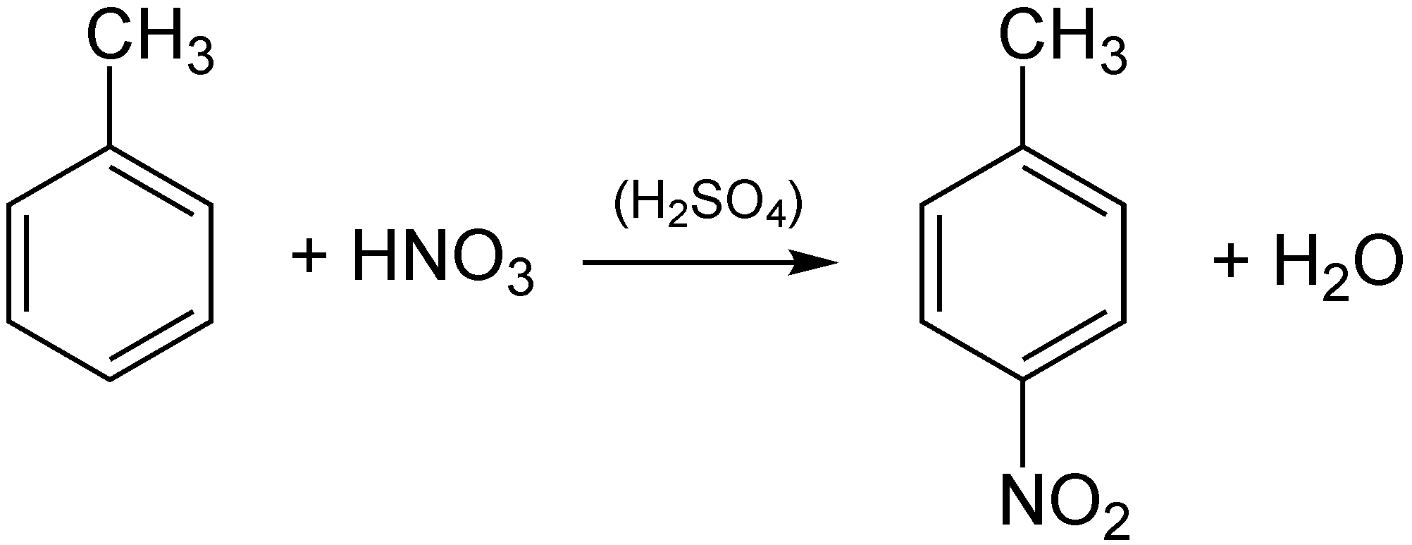 Nitrierung von Toluol